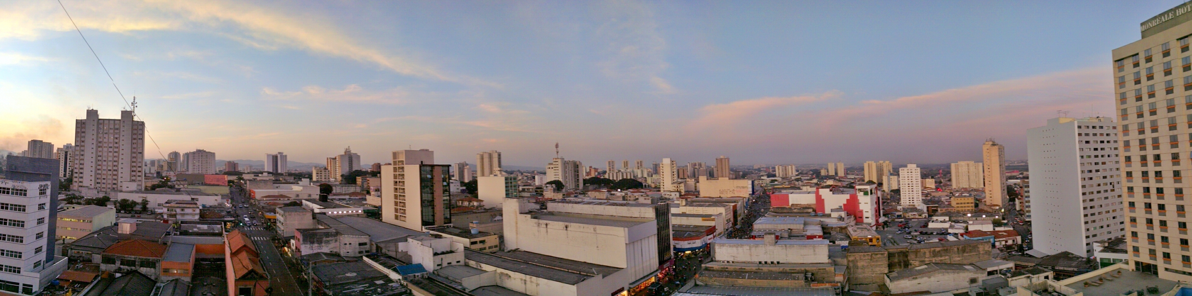 Guarulhos - SP